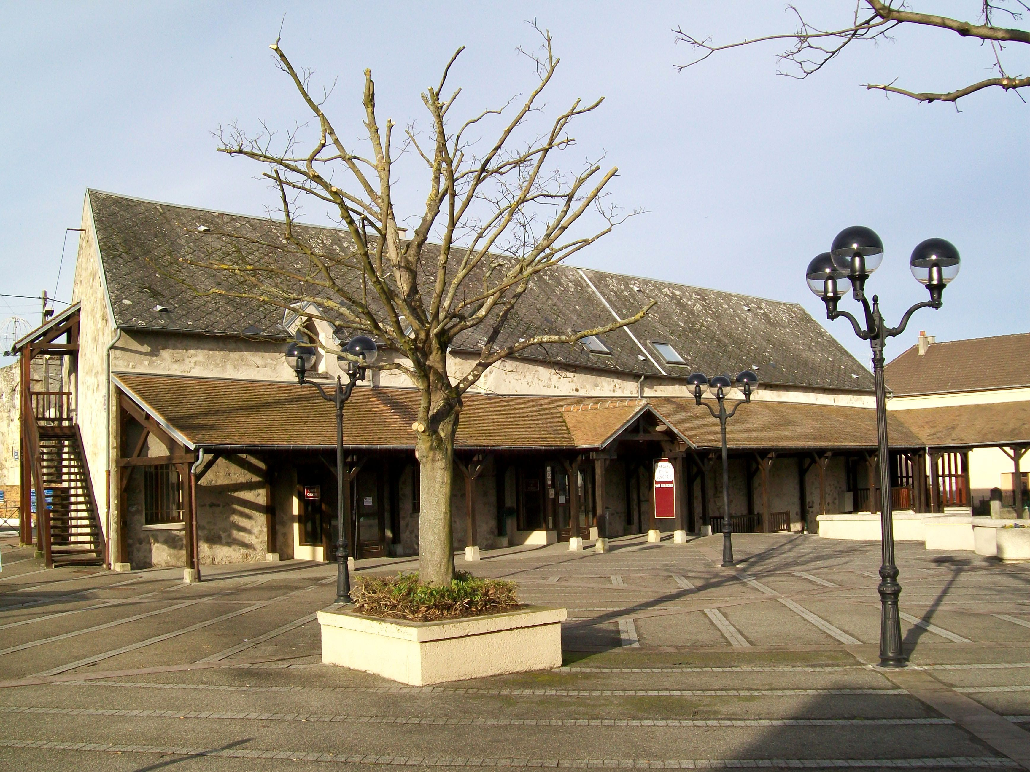 Théatre de la Bergerie à Survilliers (95), aménagé en 1988 dans un ancien bâtiment de ferme.